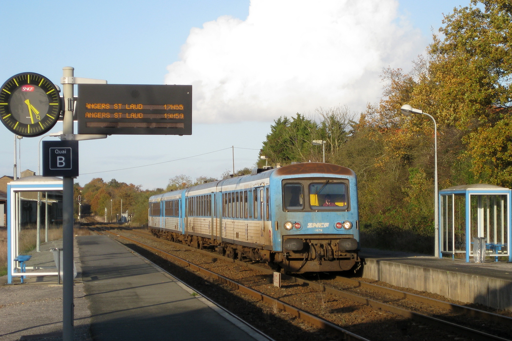 Deux EAD ((X4679+4654) assurant le TER59315 arrivent en gare de Chemillé.